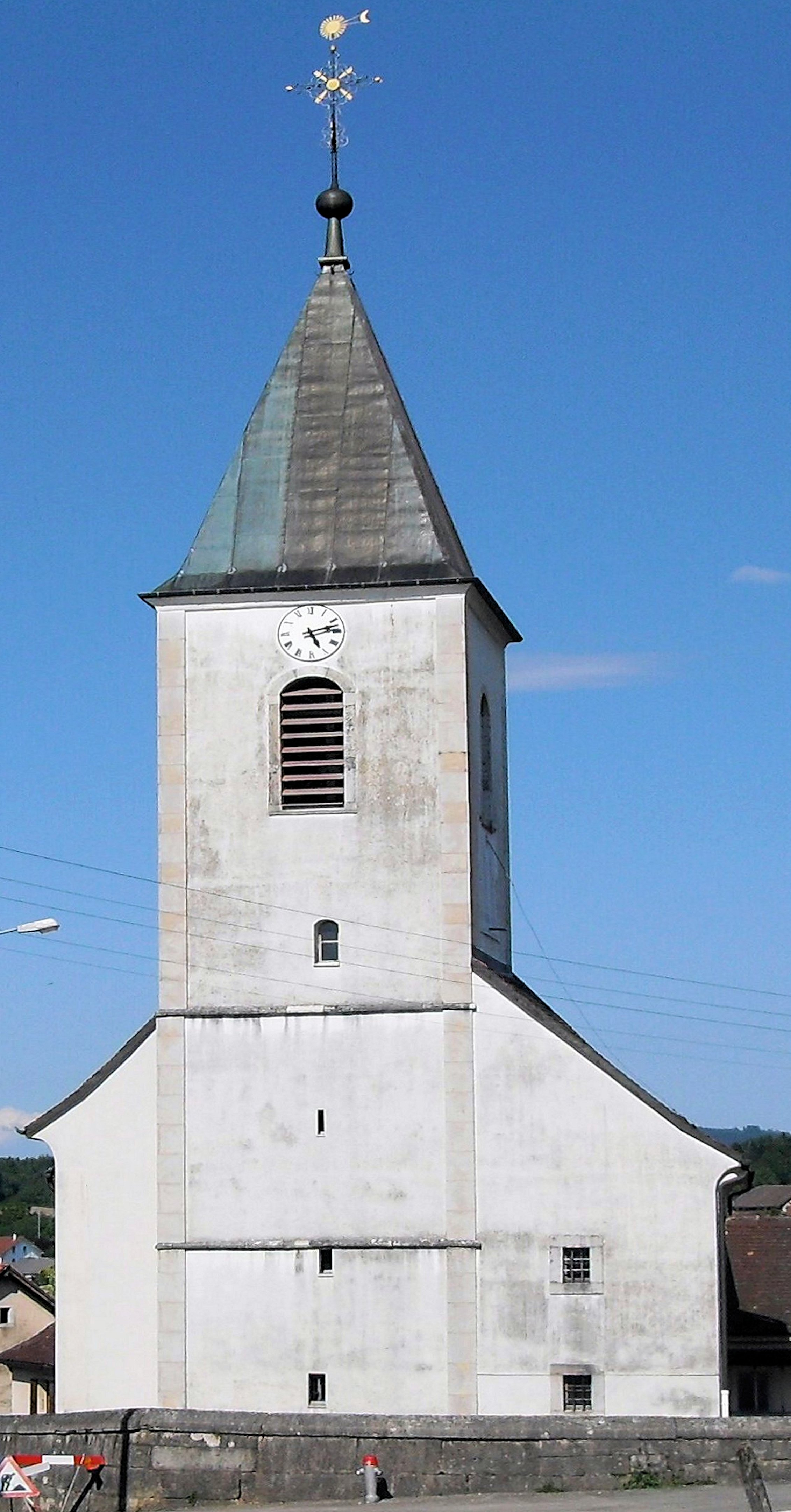 L'église Saint-Léger à Vendlincourt, Suisse